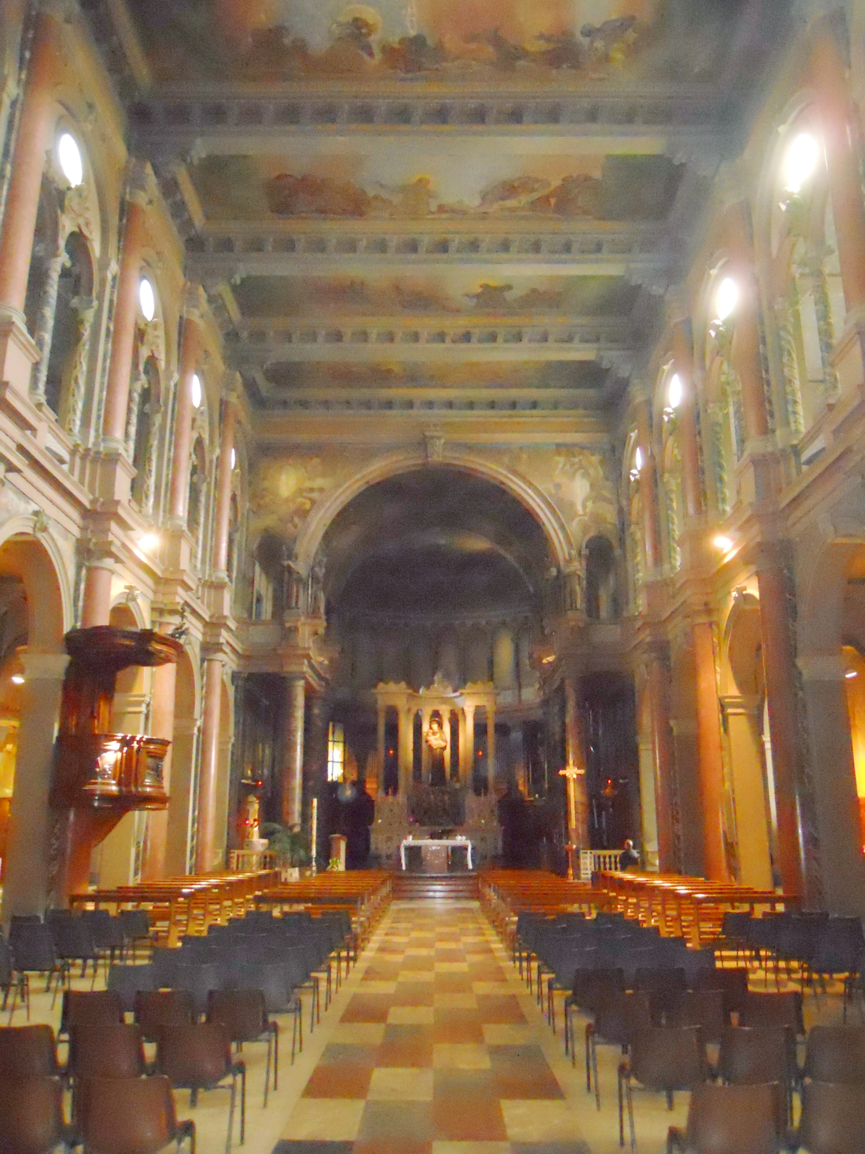 Interno a tre navate e matronei della chiesa di Sant'Antonio di Padova a Milano